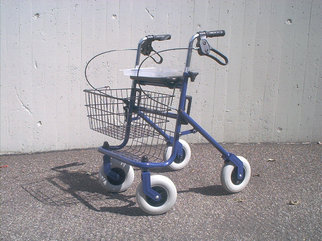 Standard Rollator mit Einkaufskorb, Tablett und 2 Parkbremsen, faltbar, Griffe höhenverstellbar. Hersteller: Casa Care Modell GoGo II